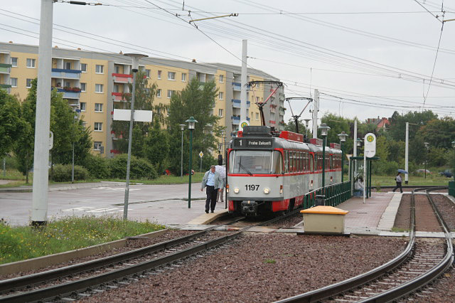 Endstelle Beesen